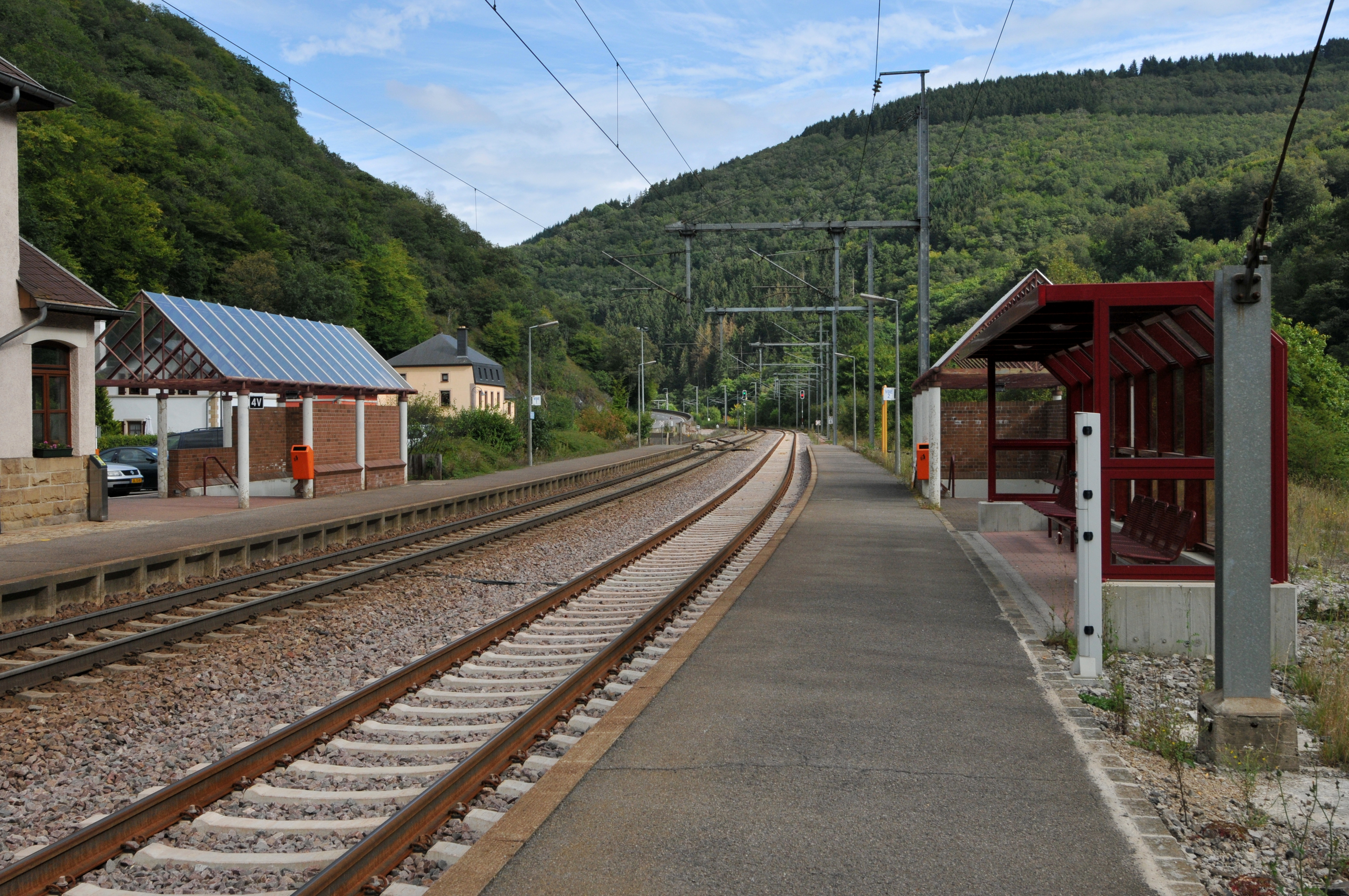 D'Gare op der Giewelsmillen.